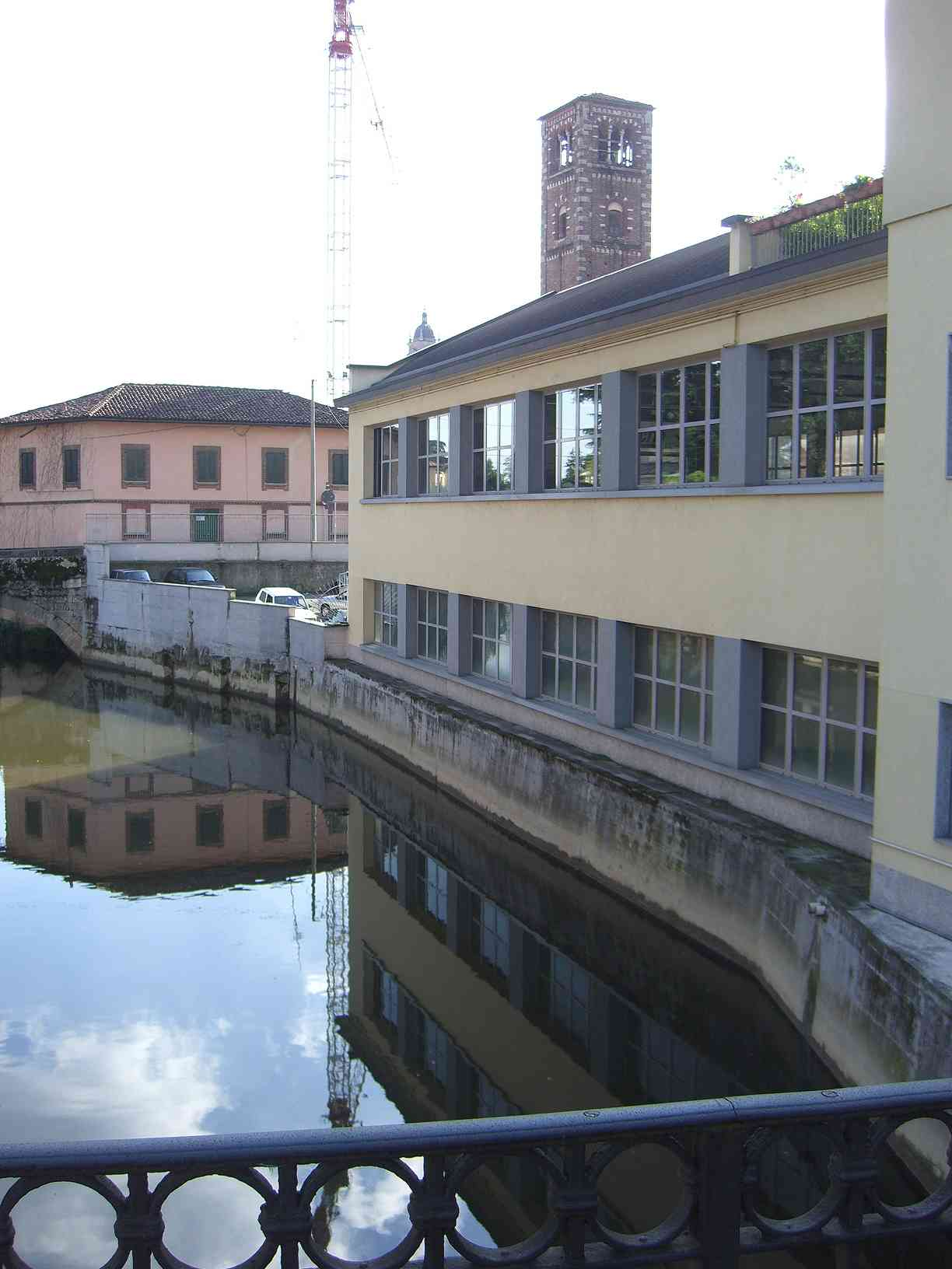 MB Monza - il campanile romanico della chiesa di Santa Maria al Carrobiolo visto dal lato destro del ponte sul Lambro di via Zanzi Carrobiolo